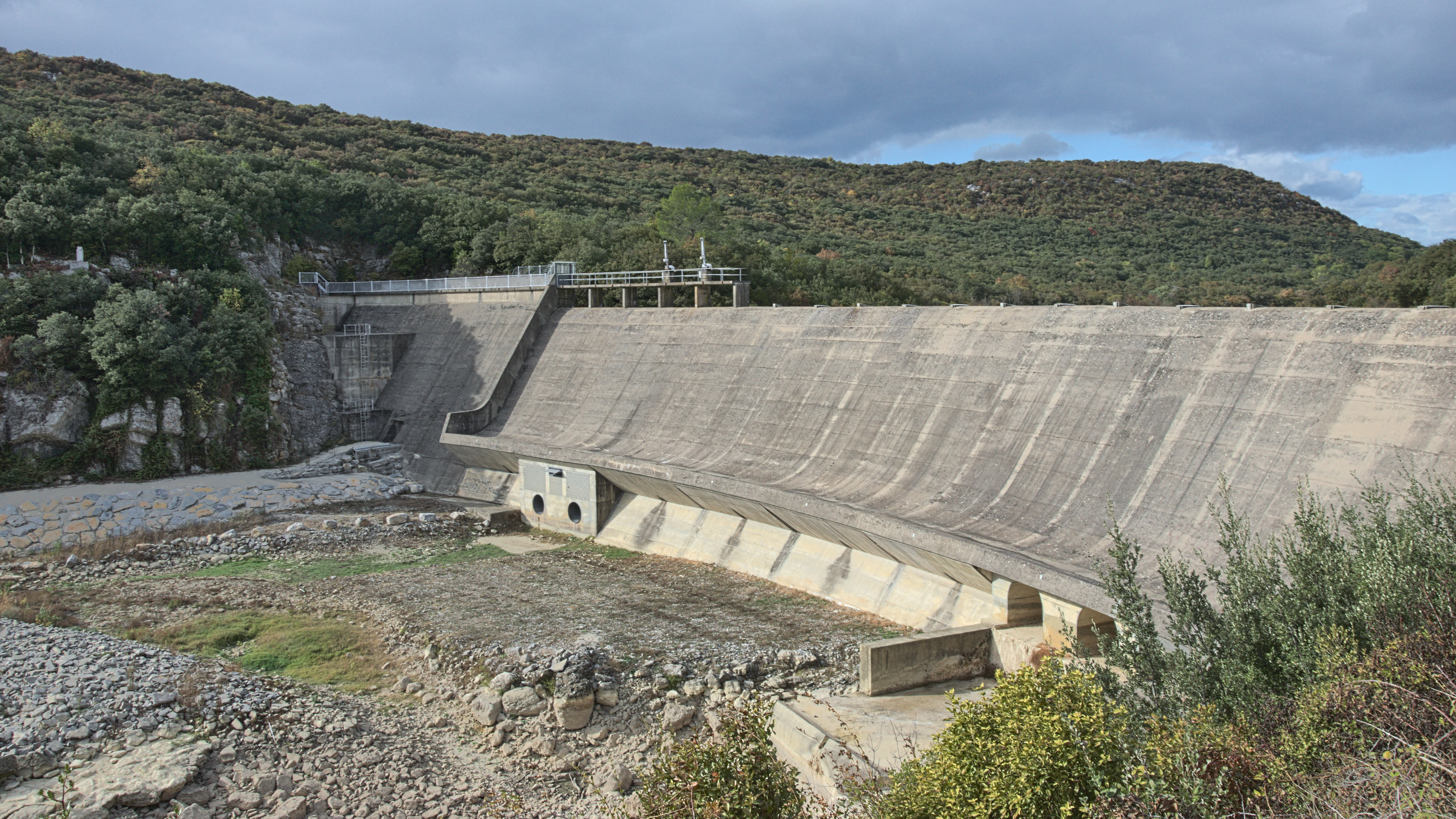 En aval du barrage de la Rouvière, barrage écrêteur de crues situé sur la rivière du Crieulon (affluent du Vidourle).